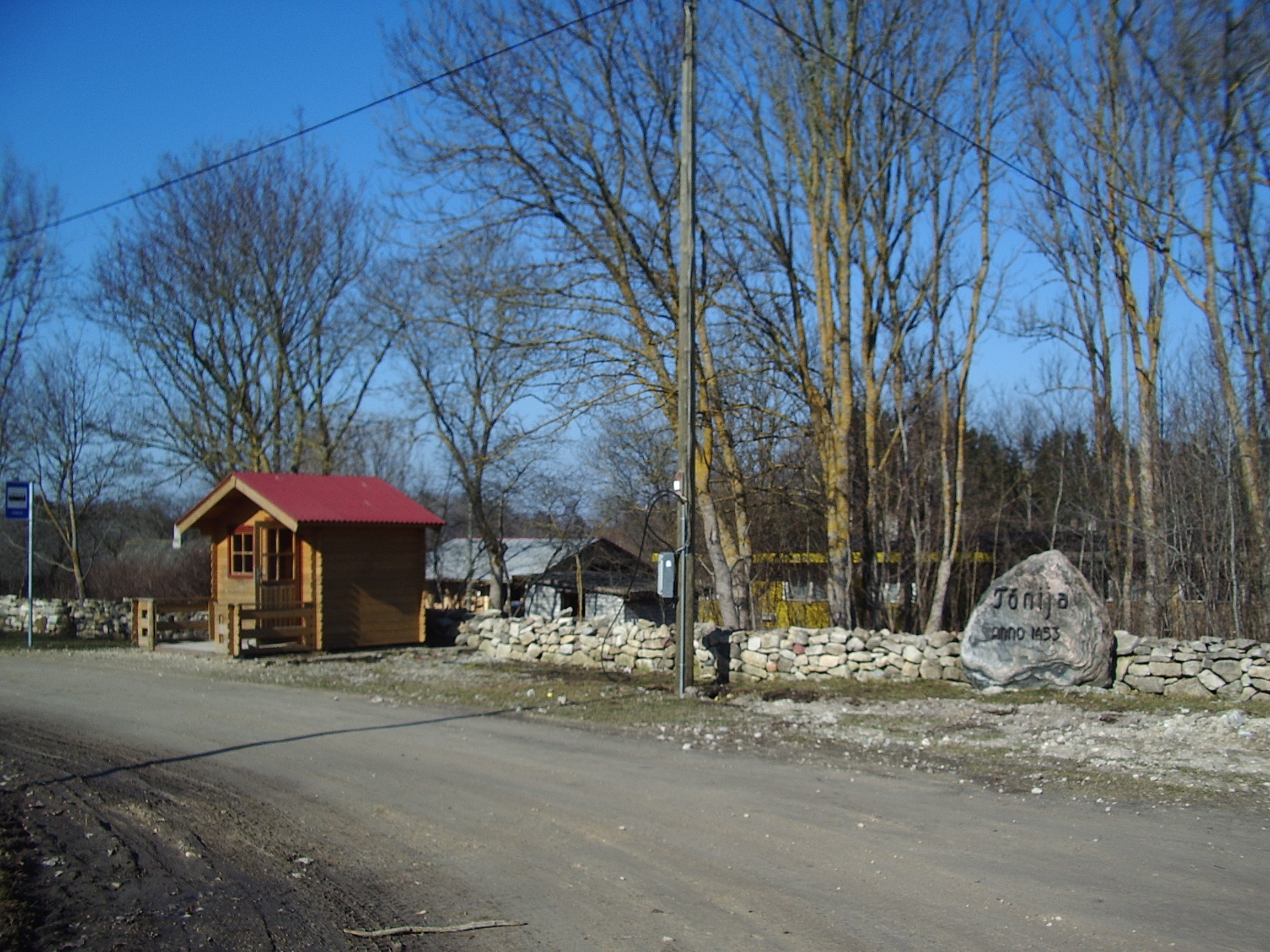 A bus stop at Tõnija village in Estonia, Saaremaa